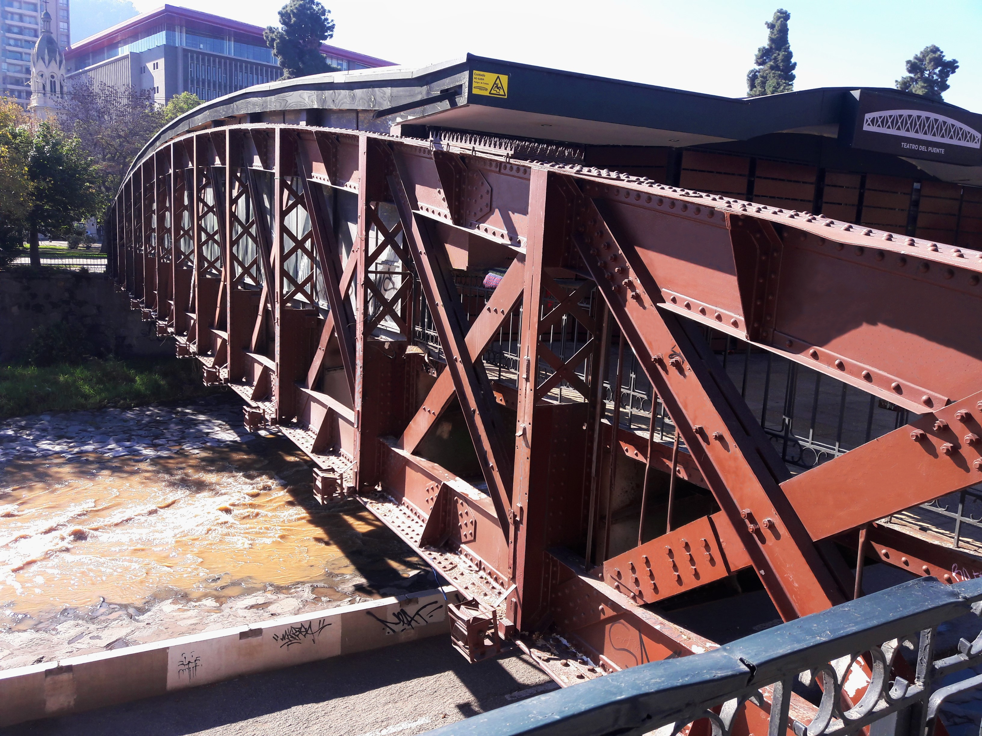 Estructura metálica puente sobre el Río Mapocho